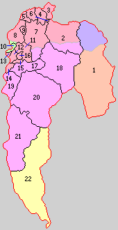 山梨県西八代郡の町村。